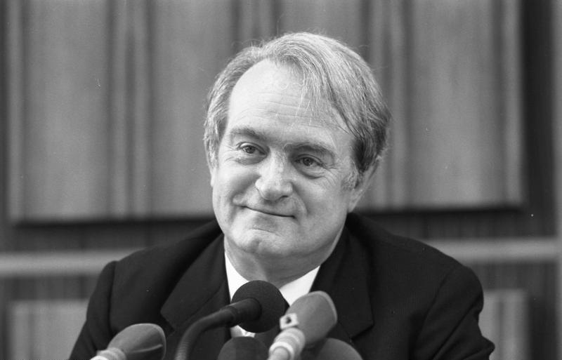 23.9.1986 Pressekonferenz des NRW-Ministerpräsidenten der SPD, Johannes Rau, zu seinem Regierungsprogramm im Falle eines Wahlsieges der SPD bei der Bundestagswahl im Januar 1987- Im Saal der Bundespressekonferenz.